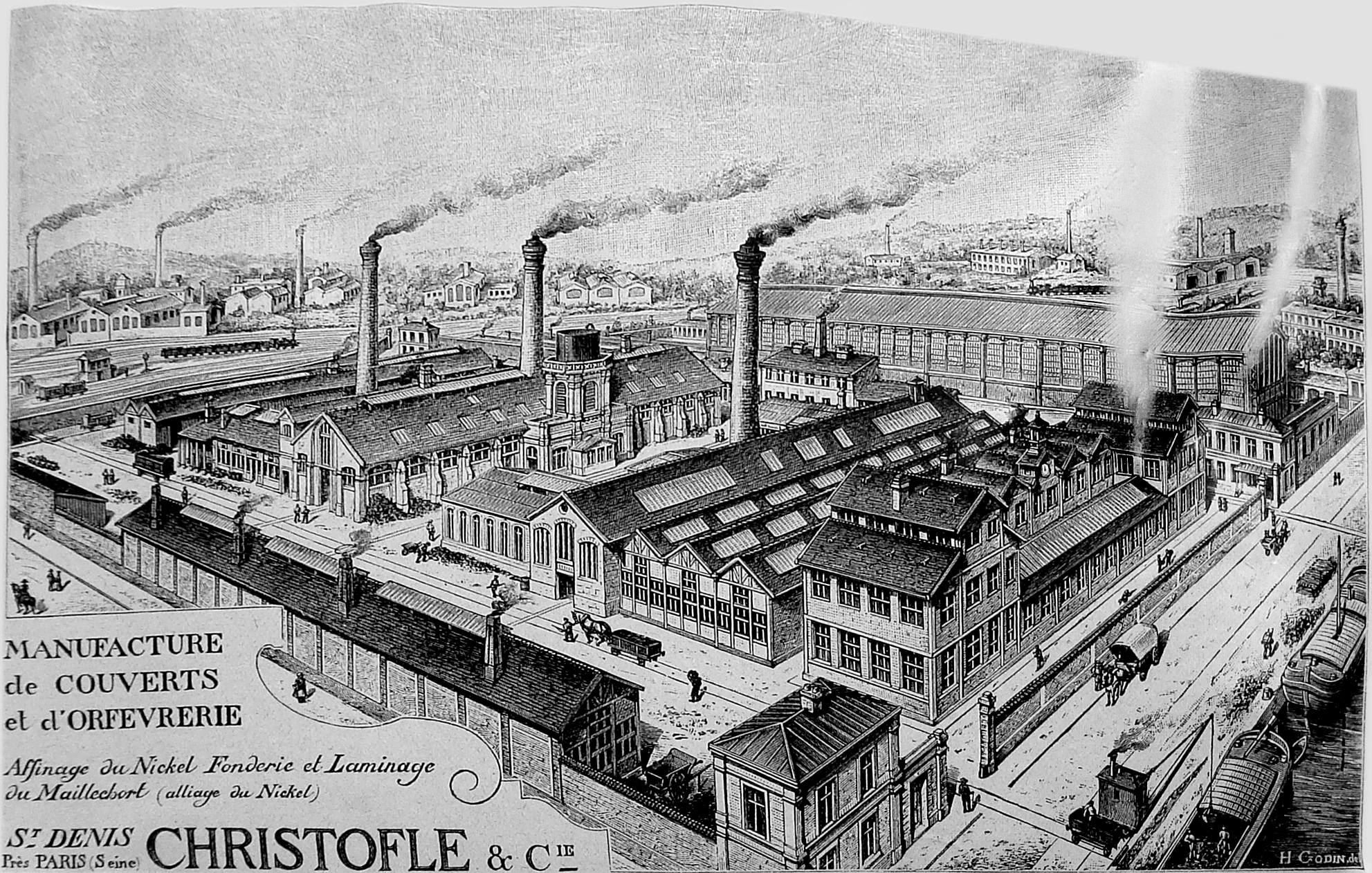 Reproduction d'une vue de l'usine Christofle de Saint-Denis